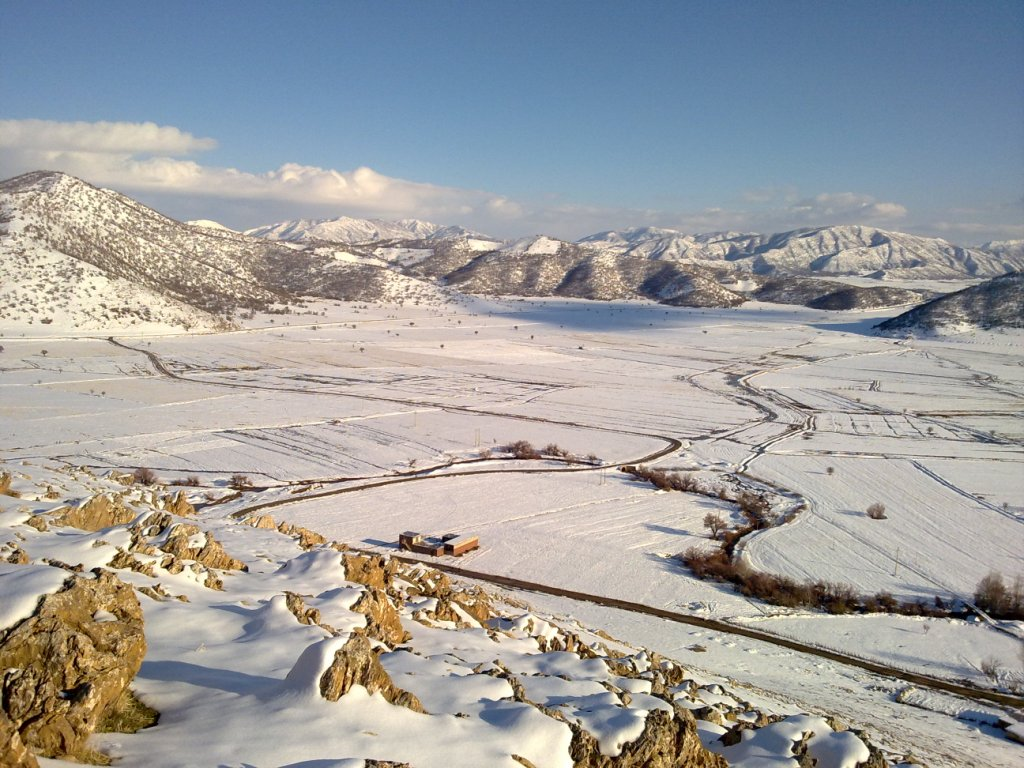 Kurdî: دیمەنی دەشتی خاو لە ژێر بەفردا